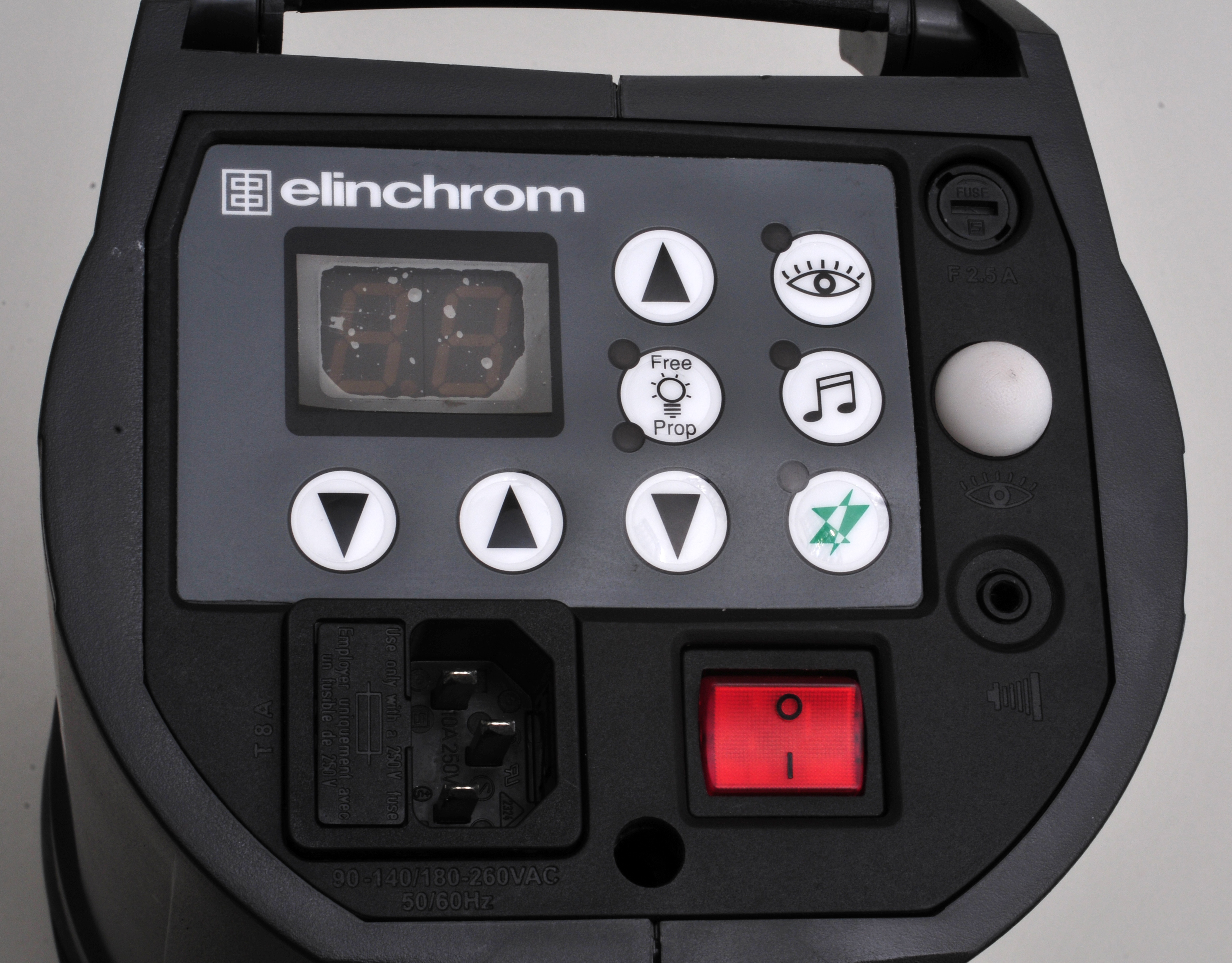 Inventur der Blitzanlage Wikimedia Deutschland)